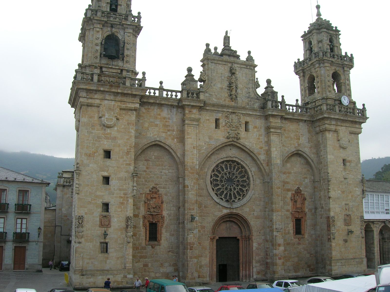 Mondoñedo Cathedral. Catedral de Mondoñedo.